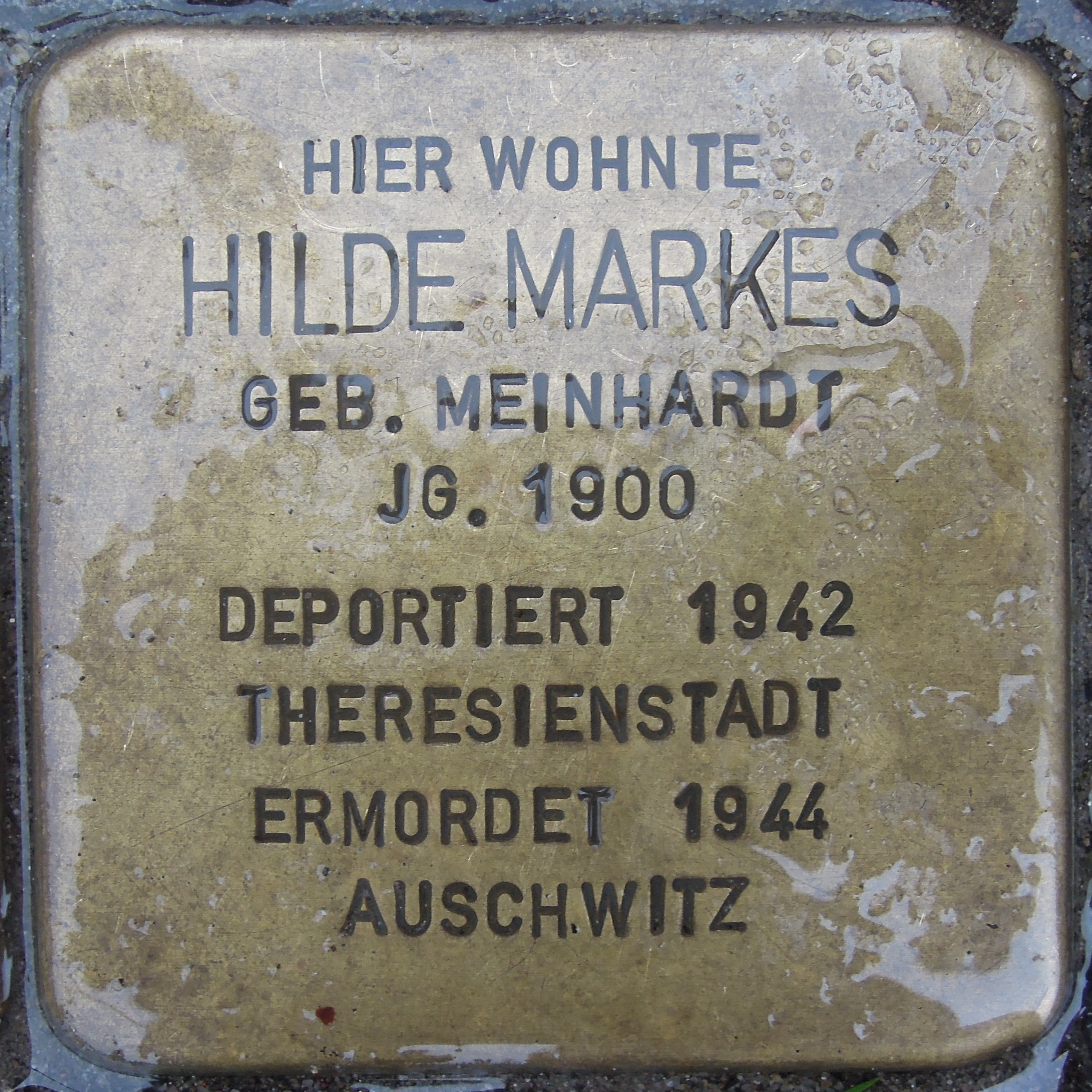 Stolperstein Hattingen Bahnhofstraße 6 für Hilde Markes